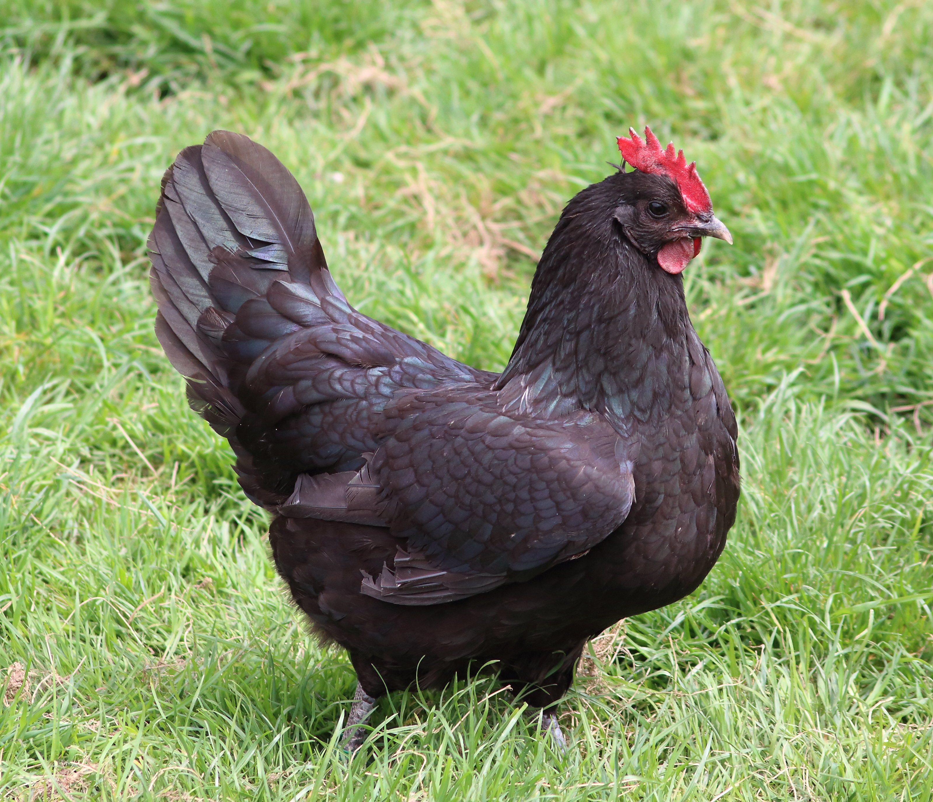 Une poule noire de Janzé à l'écomusée du pays de Rennes, commune de Rennes, Ille-et-Vilaine, Bretagne, France.